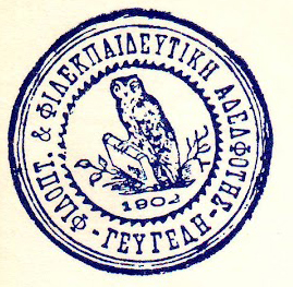 Печат на гръцки силогос в Гевгели